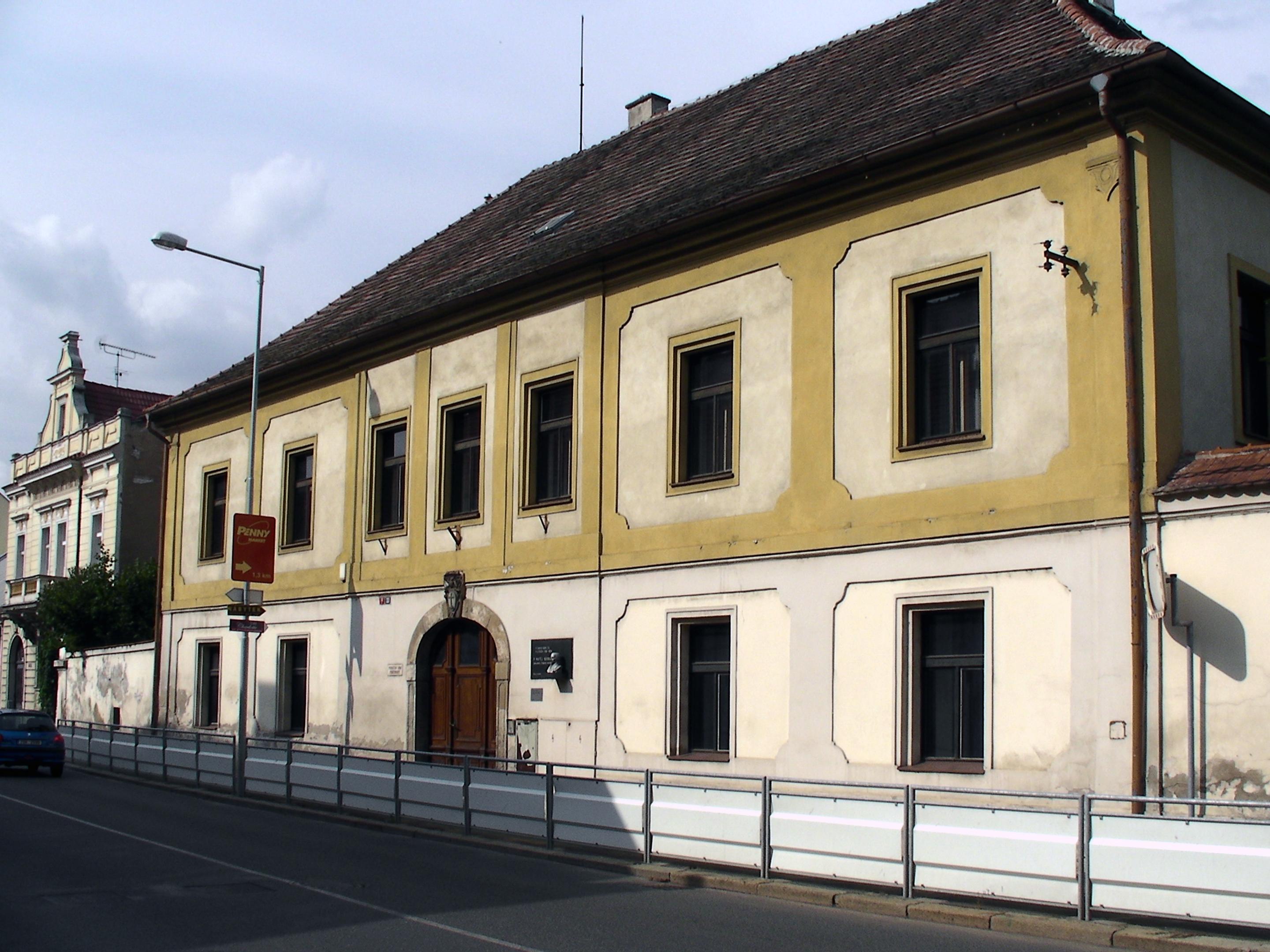 Děkanství, Palackého 72, Poděbrady.